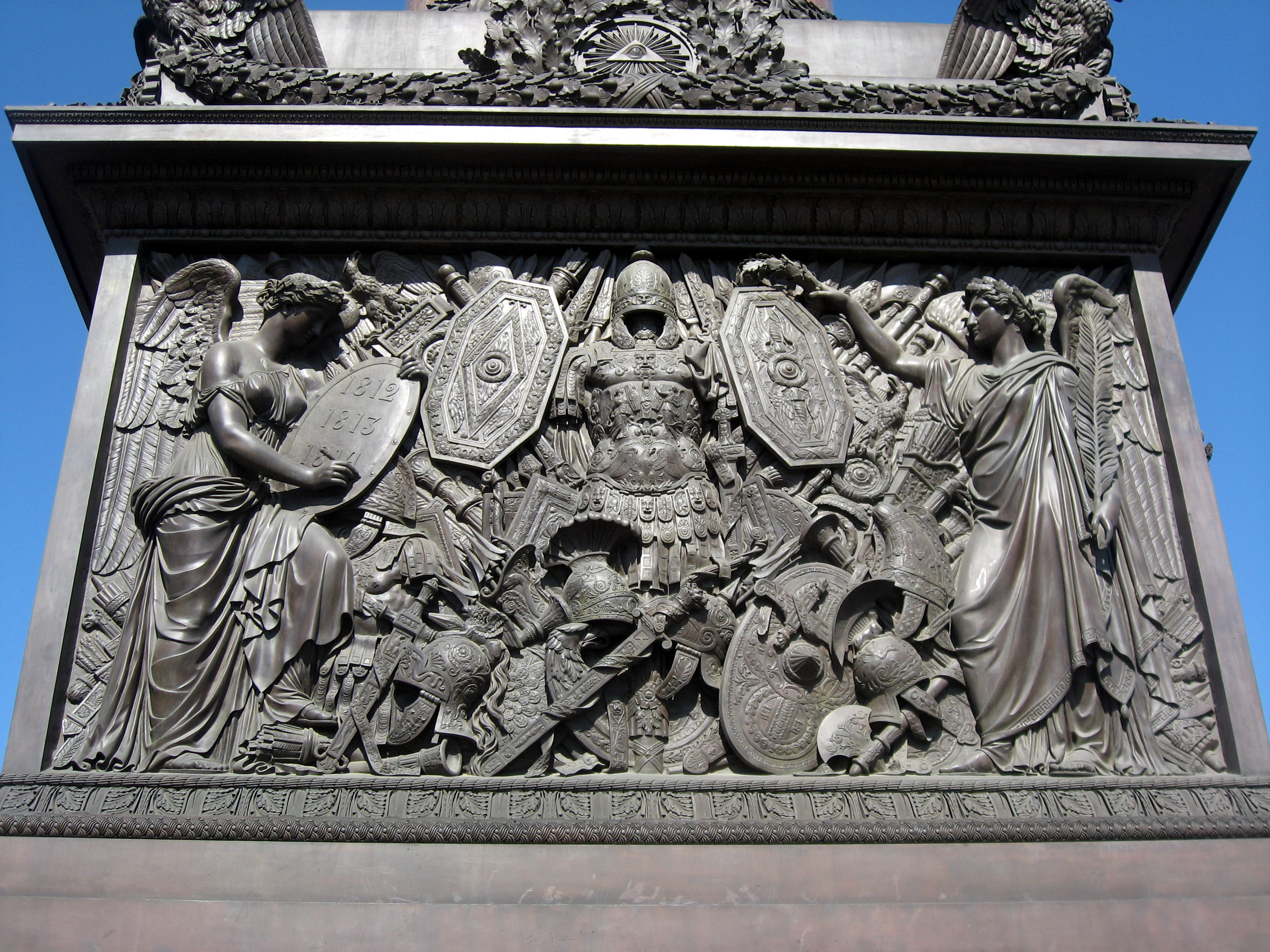 Sankt-Petěrburg